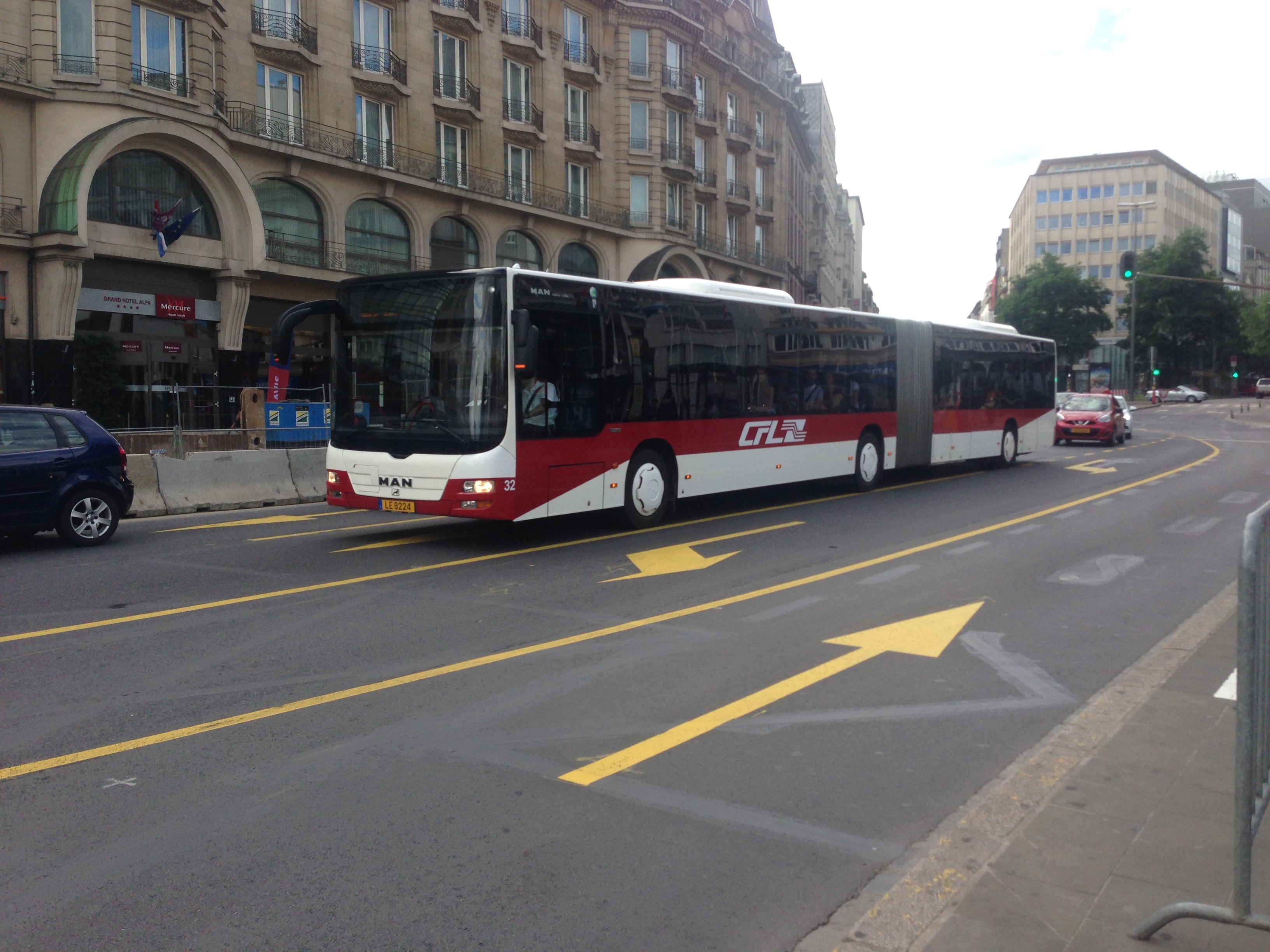 Place de la Gare in Luxemburg-Gare